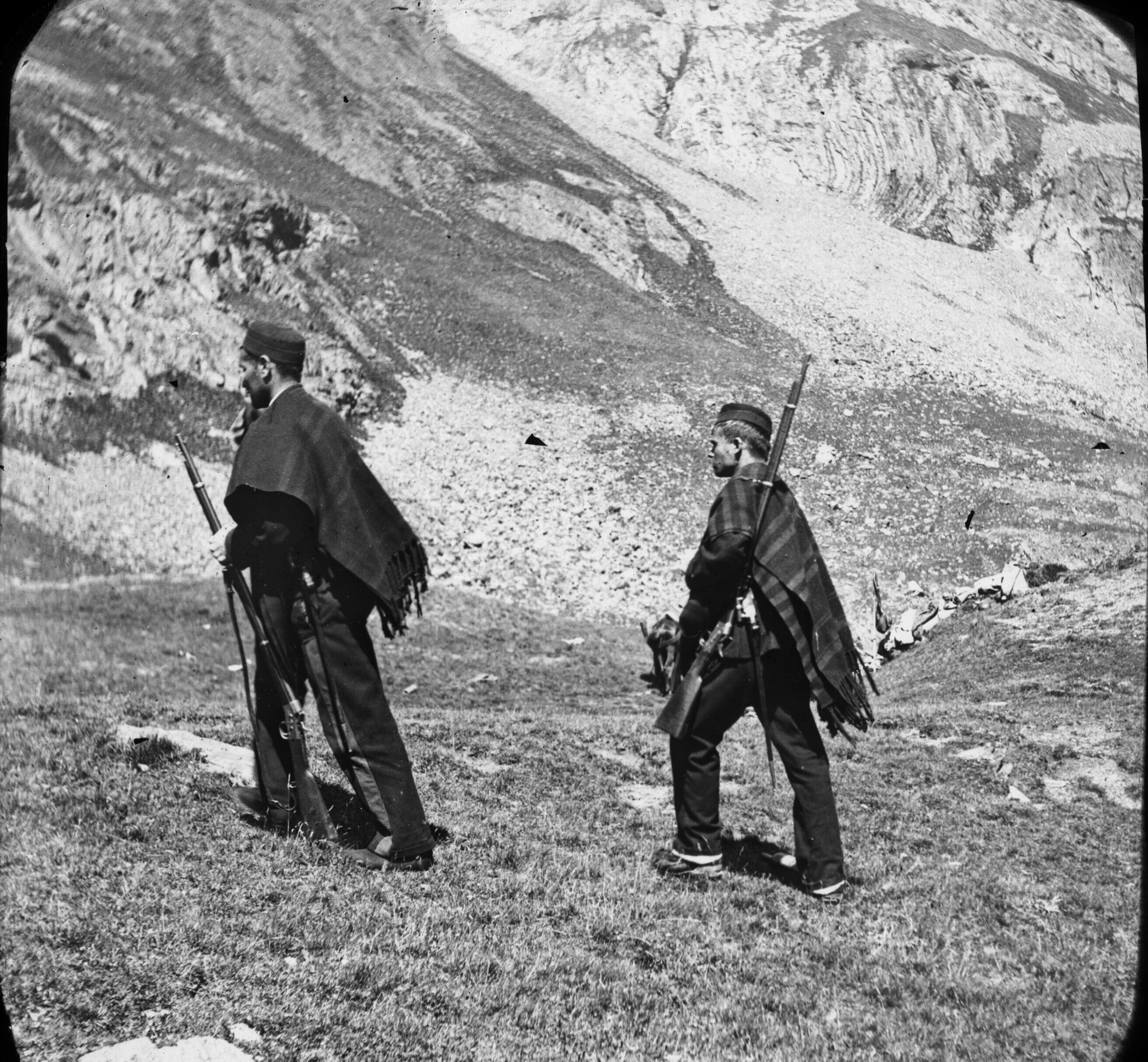 Fonds Trutat - Photographie ancienne Cote : TRU C 324 Localisation : Fonds ancien Original non communicable Titre : Carabiniers au port de Vénasque, Luchon, 12 août 1892 Auteur : Trutat, Eugène Rôle de l’auteur : Photographe Lieu de création : Bagnères-de-Luchon (Haute-Garonne ; canton) Date de création : : 1892 Mesures : 9 x 10 cm Mot(s)-clé(s) : -- Montagne -- Carabinier -- Costume traditionnel -- Fusil -- Luchonnais, Massif du (France) -- Pique (France ; haute-vallée) -- Venasque, Port de (France ; col) -- Bagnères-de-Luchon (Haute-Garonne ; canton) -- 19e siècle, 4e quart Médium : Photographies Médium : Positifs sur plaque de verre -- Positifs au collodion sur plaque de verre -- Noir et blanc -- Scènes Bibliographie : Lévy (André). - Le dictionnaire des Pyrénées : encyclopédie illustrée. - Toulouse : Privat, 1999. - 922 p ; 32 cm. Bibliothèque de Toulouse. Domaine public